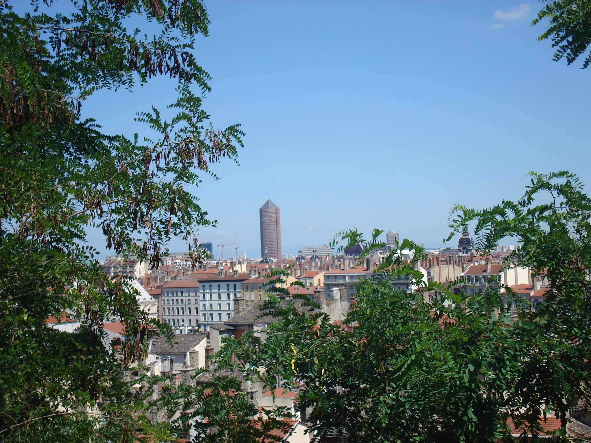 Vue sur la Part-Dieu depuis la montée du Gourguillon